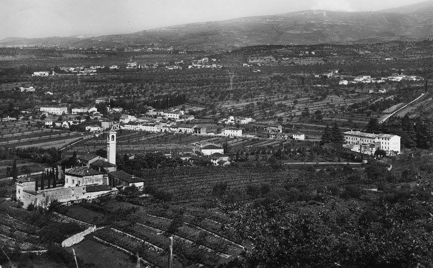 Fotografia d'epoca di Arbizzano (frazione di Negrar, provincia di Verona)